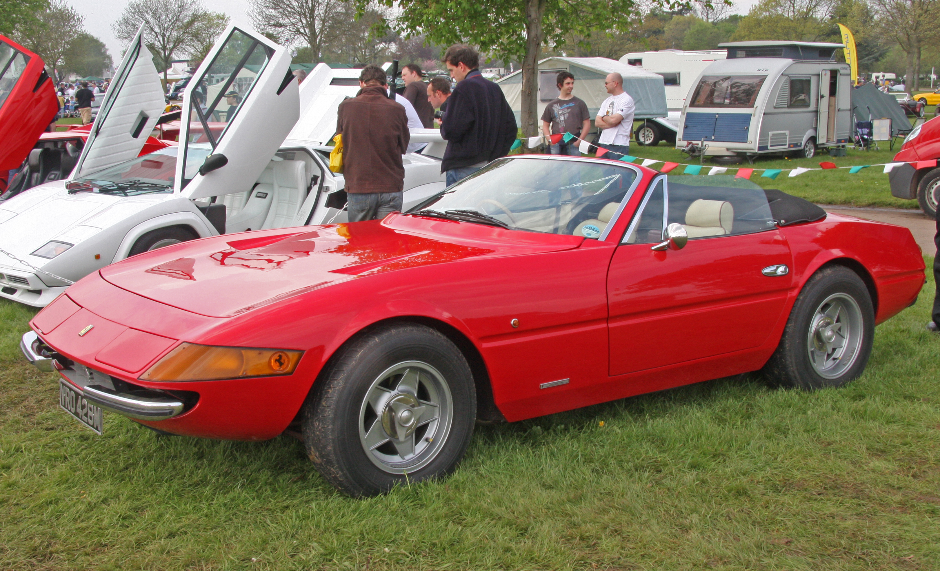 Ferrari replica